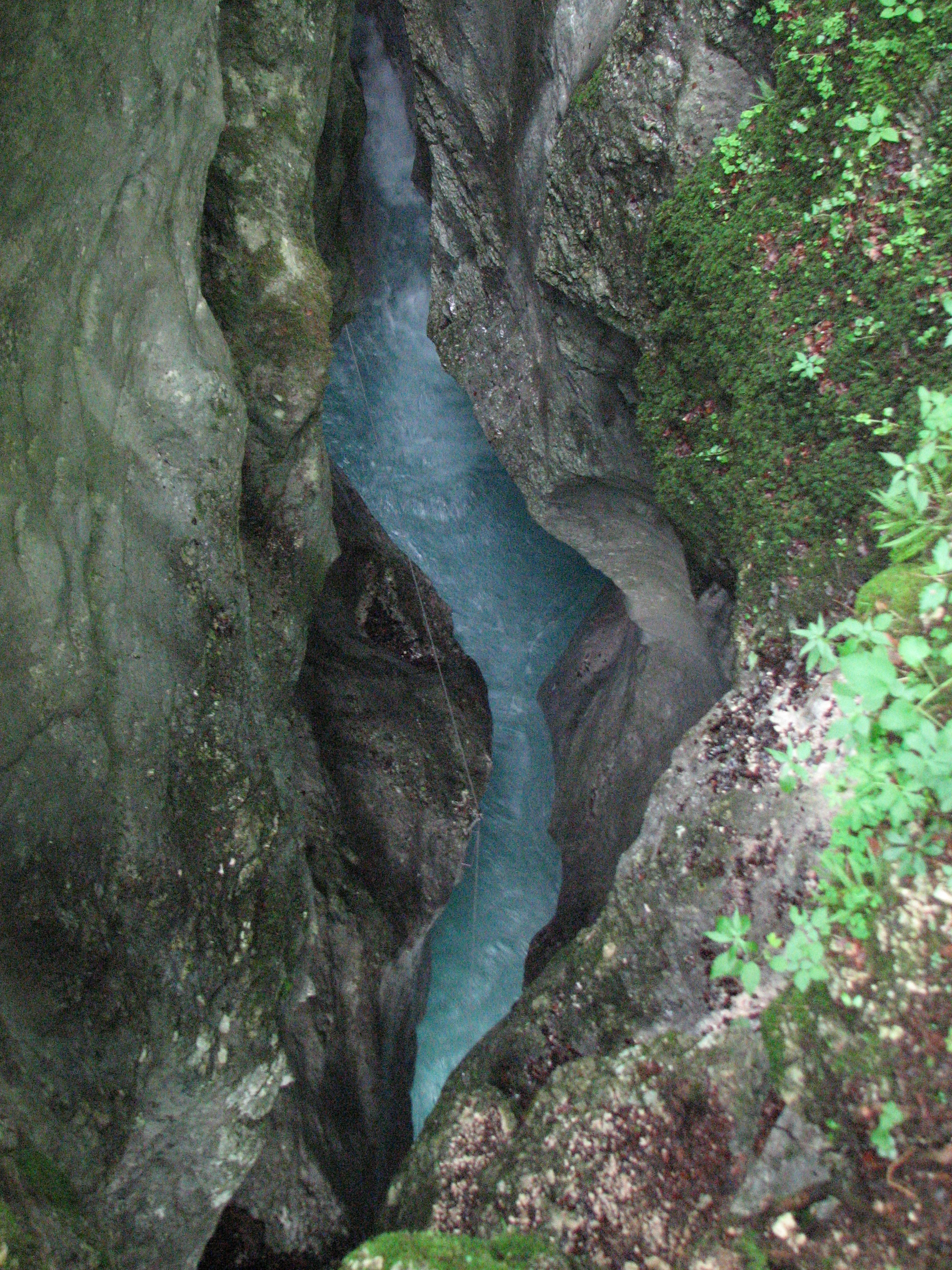 Veliki Predoselj je nekaj sto metrov dolga, okrog 20 metrov globoka in v najožjem delu samo nekaj metrov široka soteska v gornjem toku Kamniške Bistrice